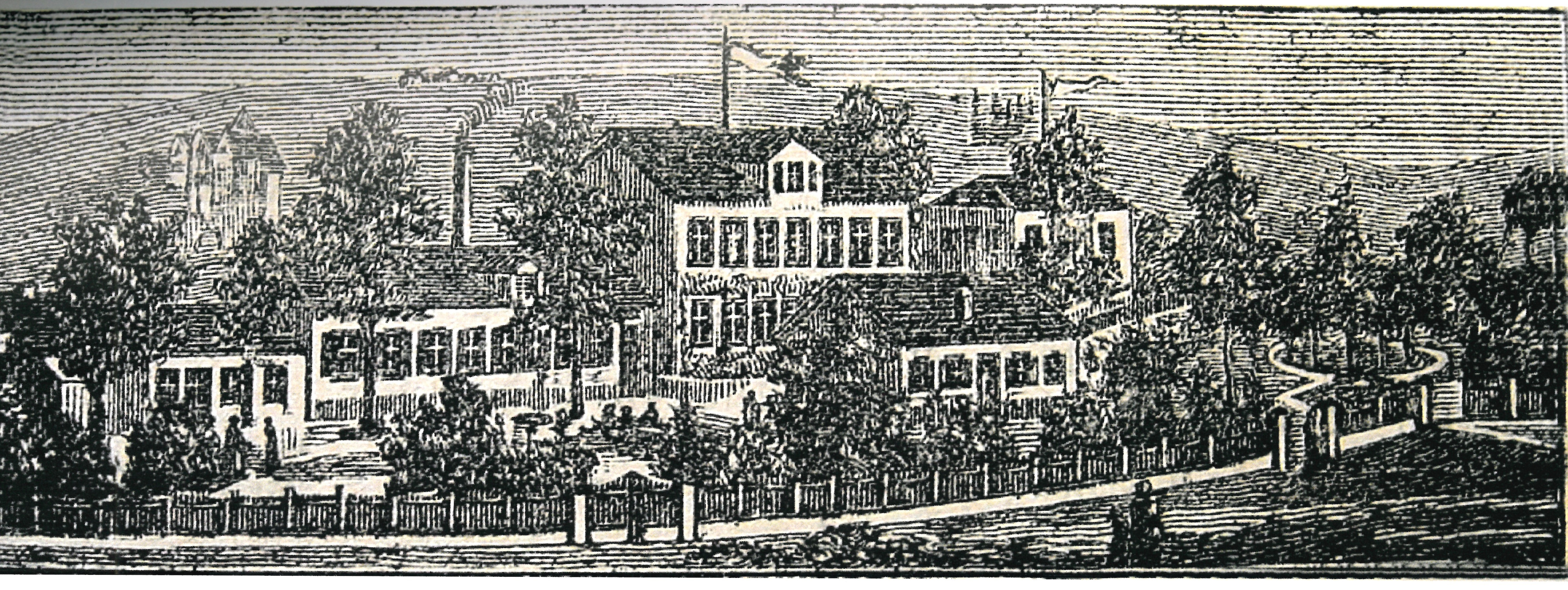 Abbildung Bad Sennfeld im Schweinfurter Tagblatt, Januar, Februar 1887.